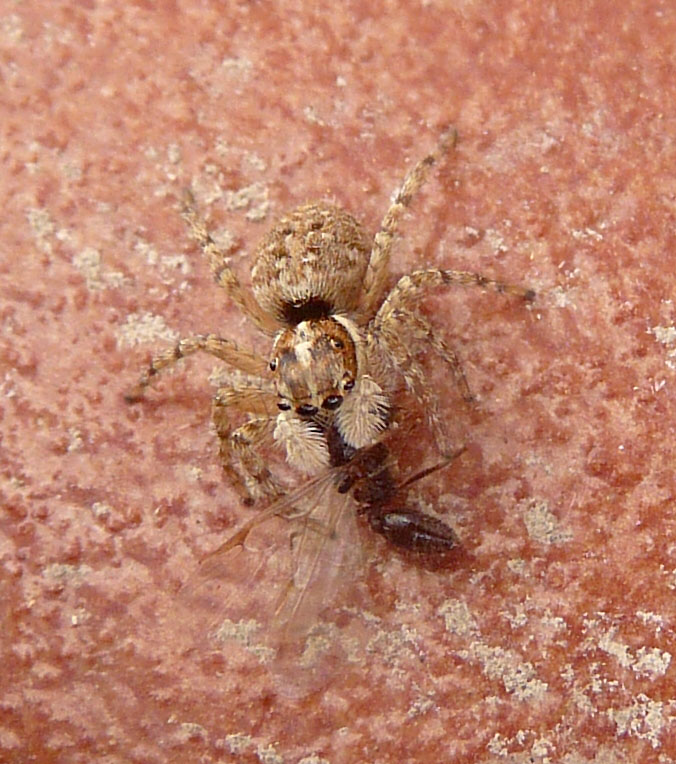 Jumping Spider (Menemerus semilimbatus)? Male